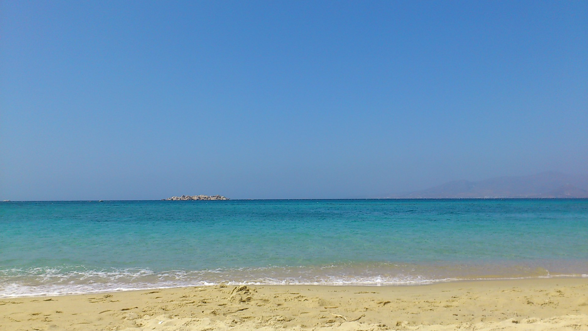 'Plaka' Beach